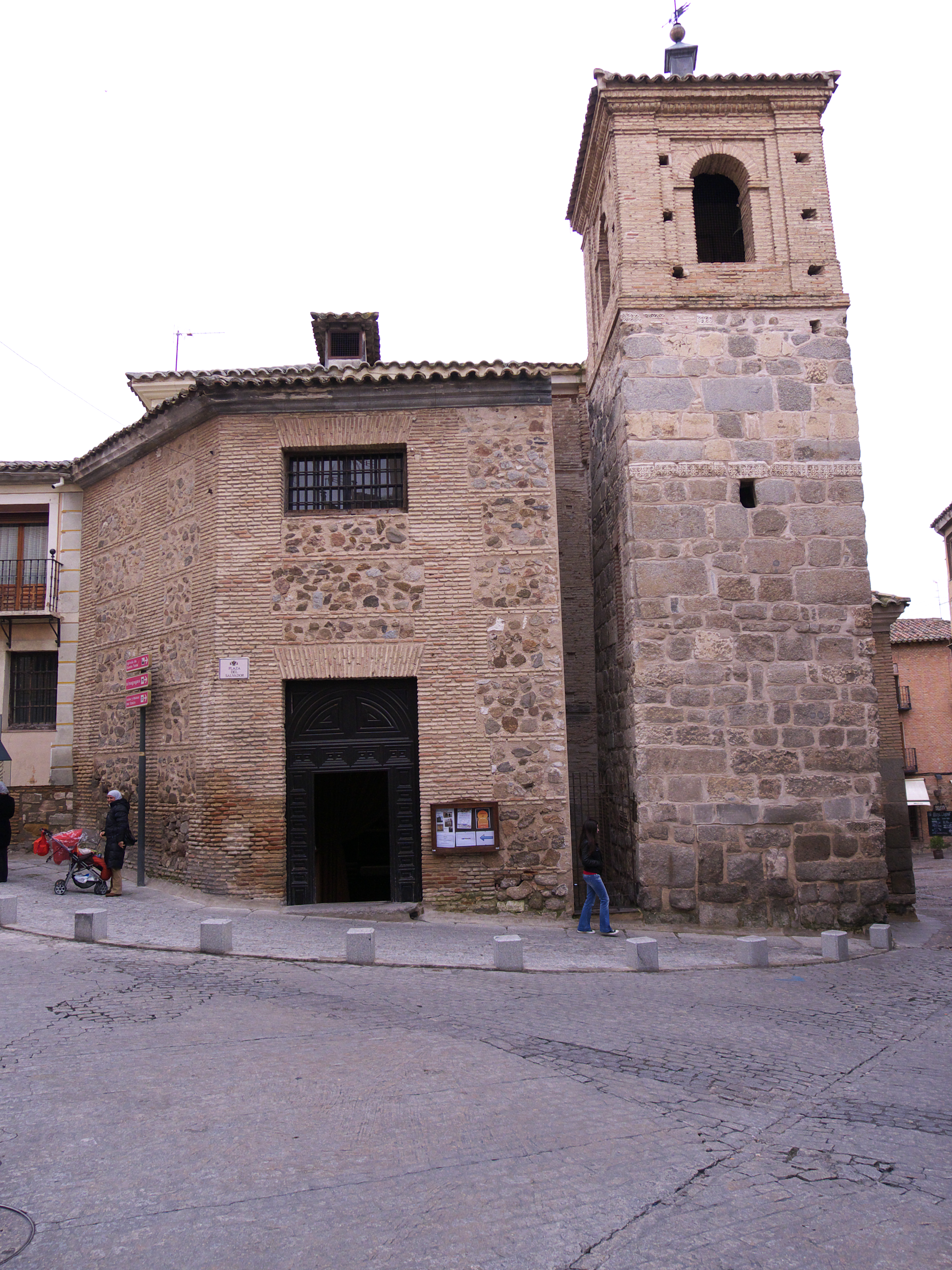 Un magnífico ejemplar de la Toledo musulmana. Los nuevos descubrimientos, un éxito. Conserva importantes testigos de la época visigoda.